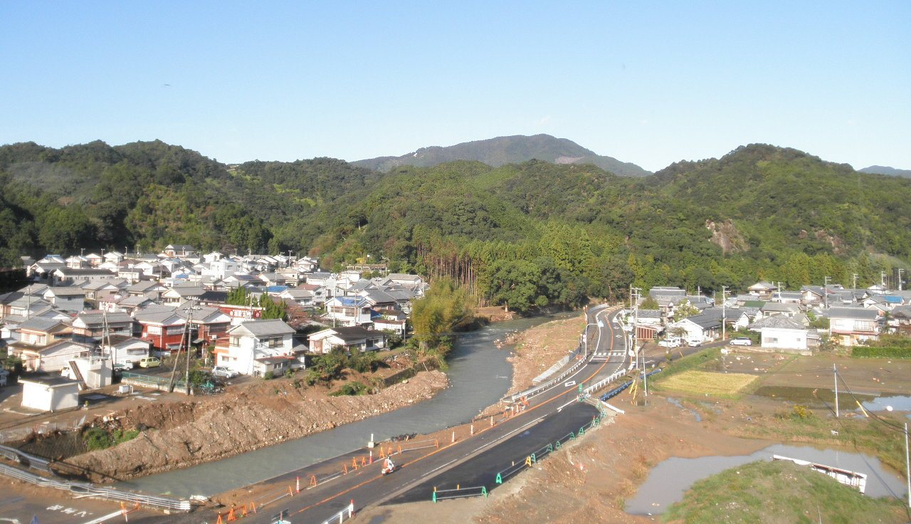 和歌山県東牟婁郡那智勝浦町川関 和歌山県道46号那智山勝浦線